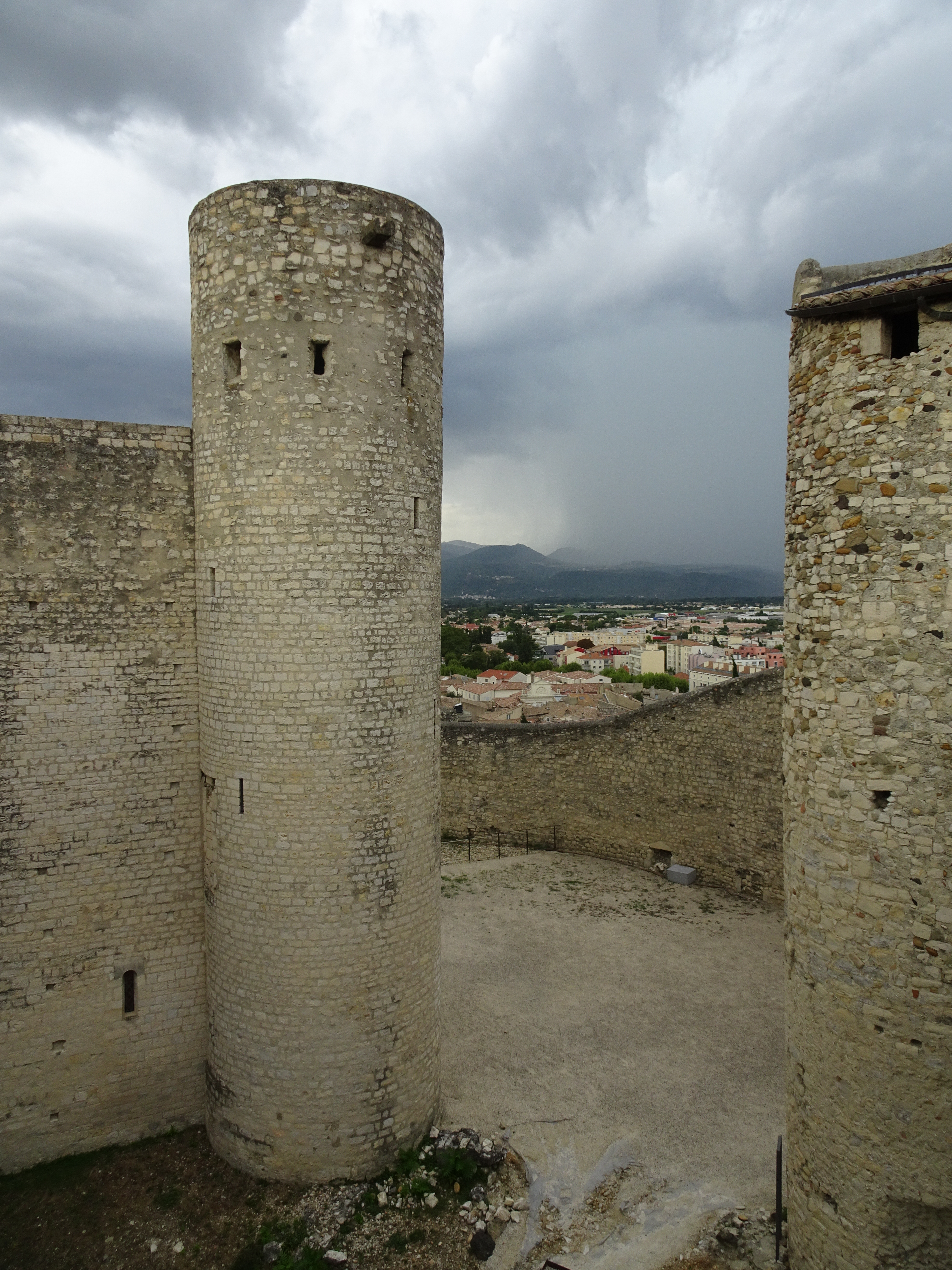 Le château des Adhémar date du 12° siècle. Longtemps laissé à l’abandon une rénovation de bon gout en a fait un château qui vaut vraiment le cout d'être visité. On est surpris par l'étroitesse du chemin de ronde, puis par les grandes salles qui abritent des expositions d'art contemporain. (ou autres selon les saisons). .